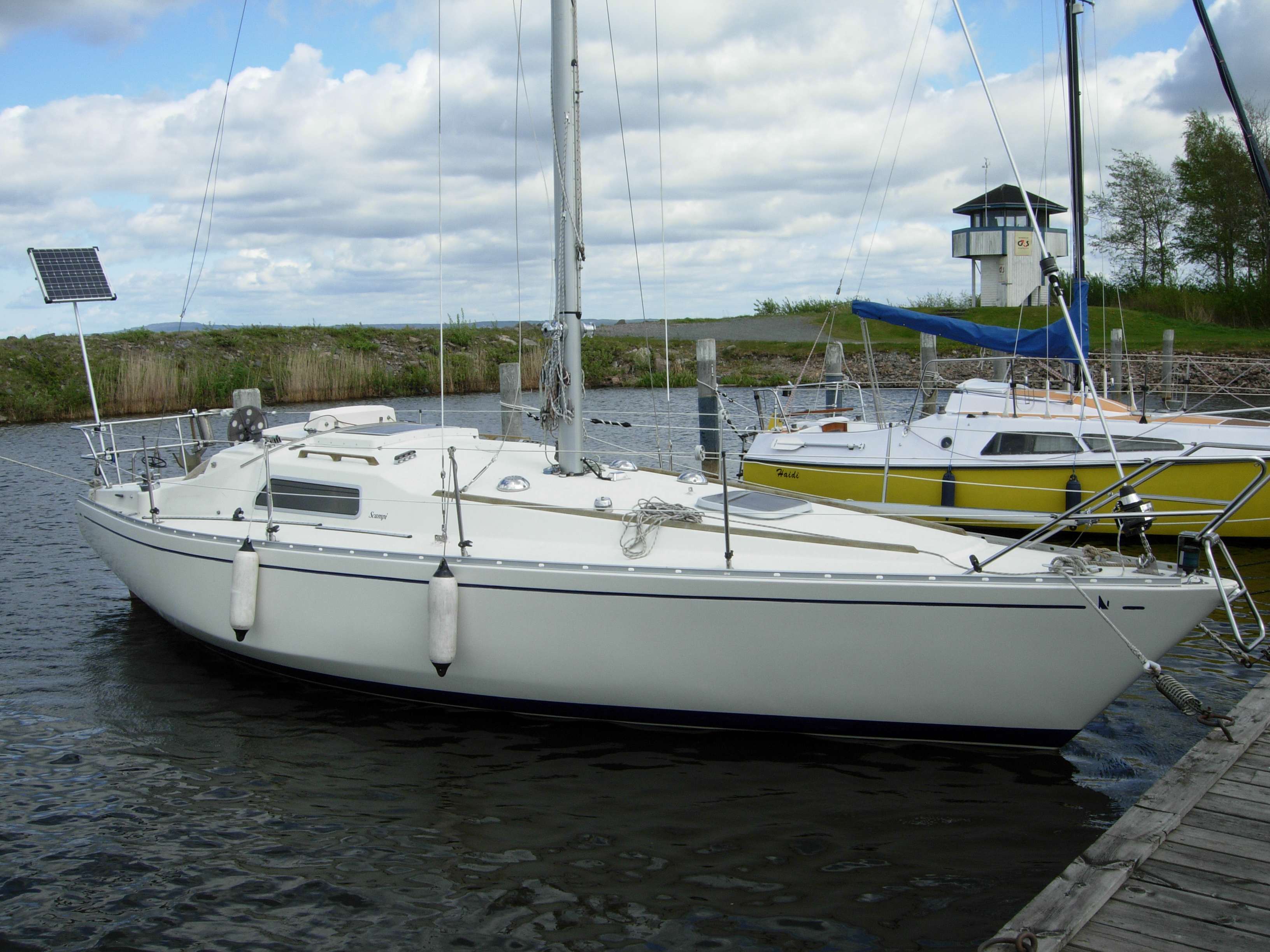 Scampi, konstruerad av Peter Norlin